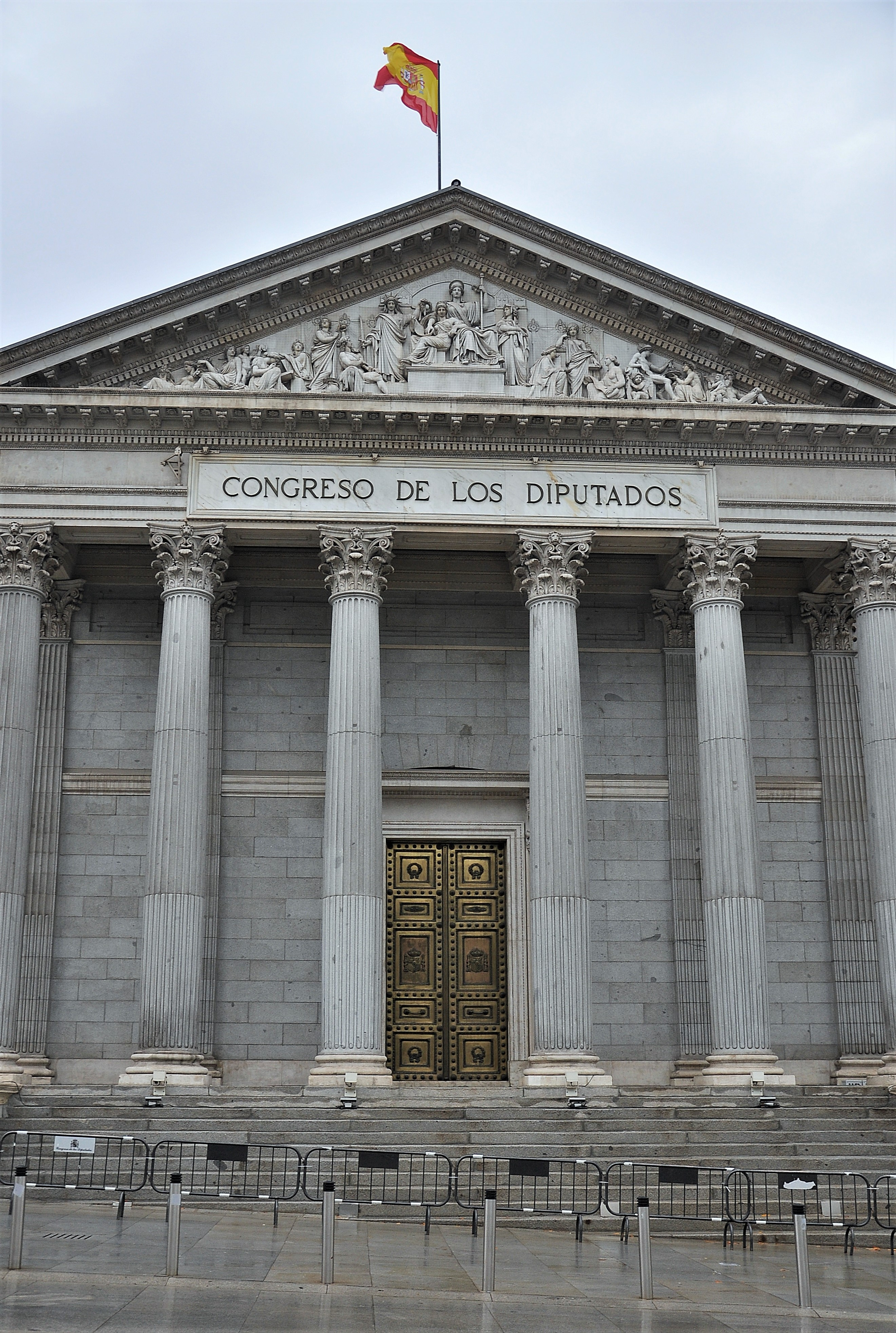 Madrid-2019